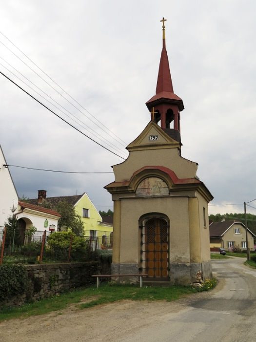 Kaple svatého Floriána, parc. st. 68, u čp. 17 a 18, Stavenice.